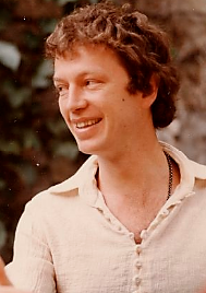 Portrait par Fernand Michaud. Festival d'Avignon 1972.